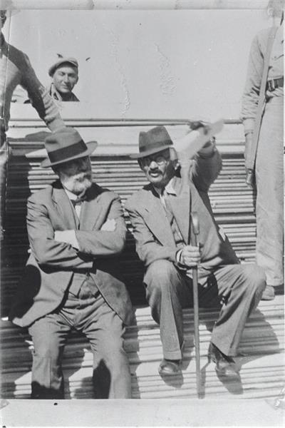 חניתה - מר ויץ ומר אוסישקין